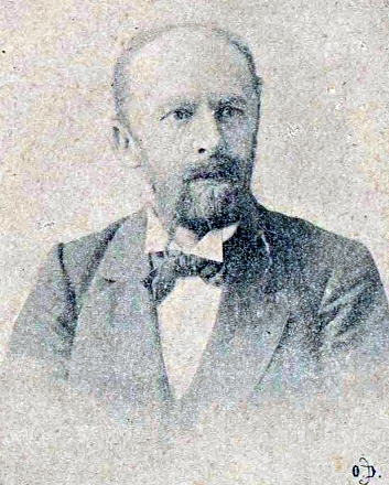 Торопов, Андрей Дмитриевич